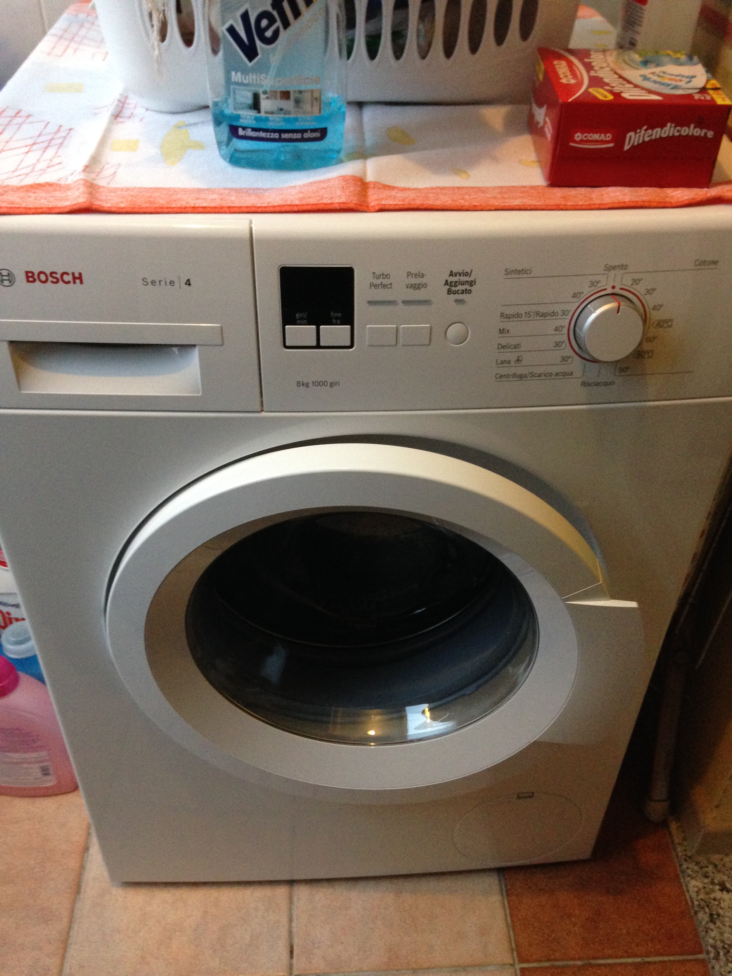 Nuova lavatrice multifunzione Bosch in uso dal 2016